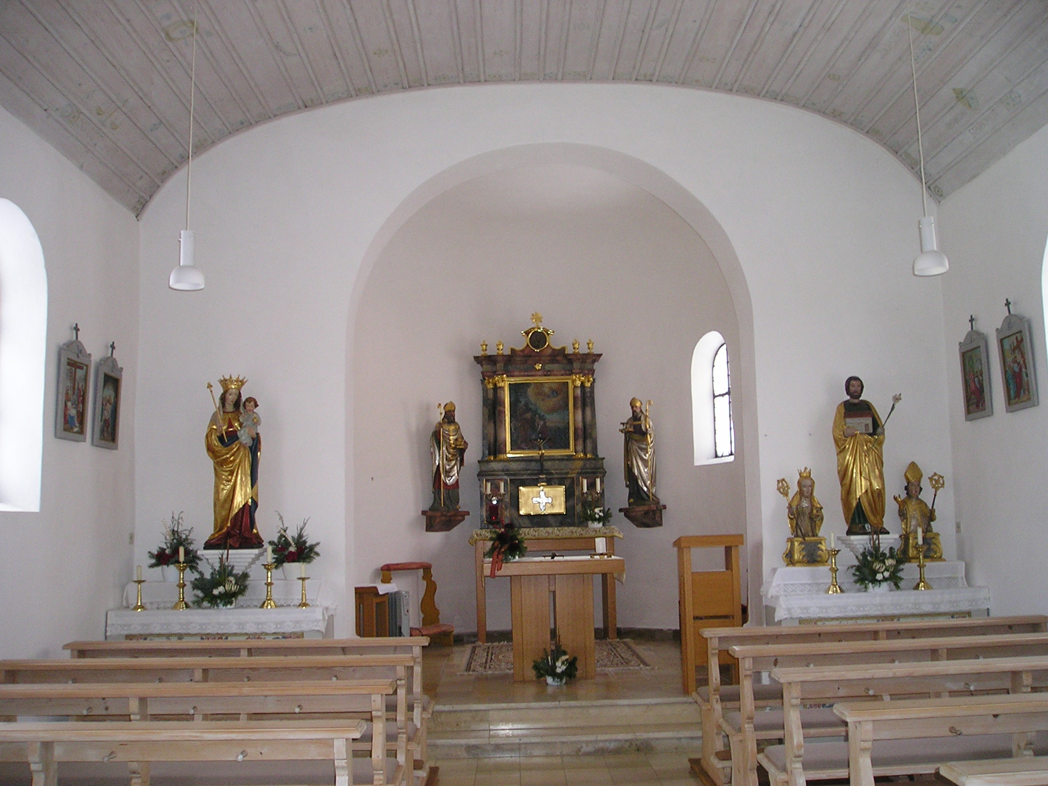 Berletzhausen, Landkreis Eichstätt, Regierungsbezirk Oberbayern, Ortskapelle, Innenansicht